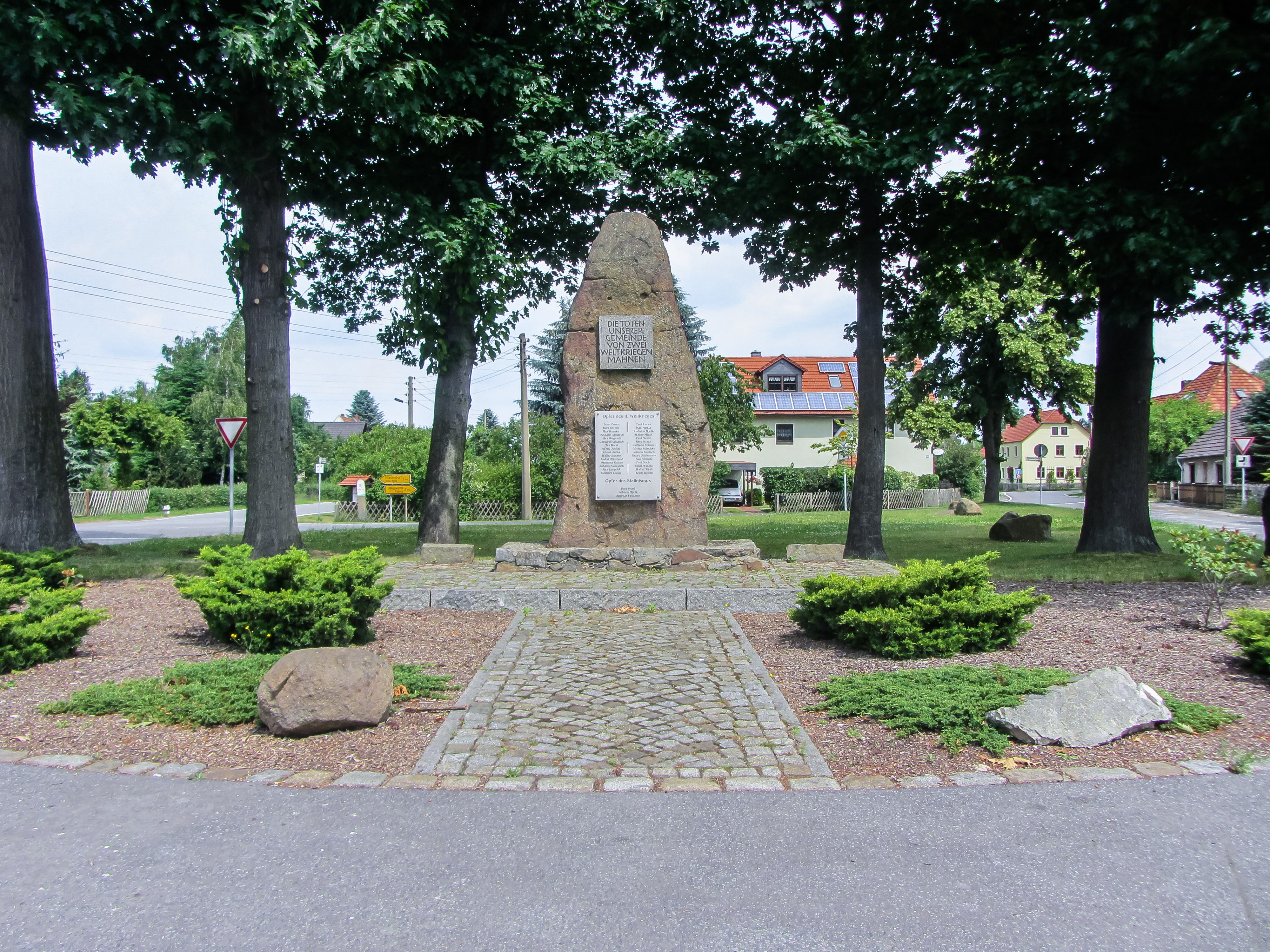 Gefallenendenkmal WK I, WK II Zescha